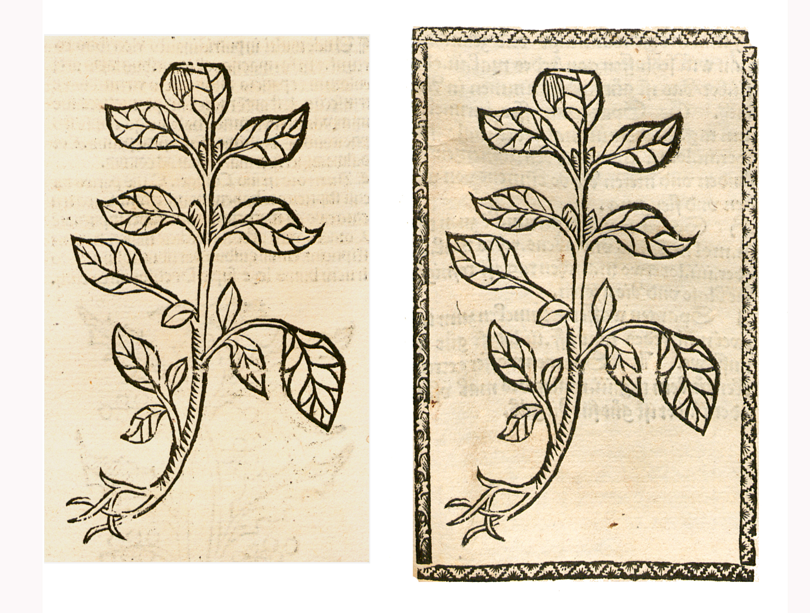 Abbildung vonː Sant Peters Krut (Parietaria officinalis)